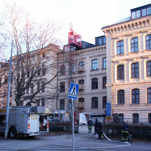 Firefighters outside Katarina södra skola, Stockholm, Sweden.